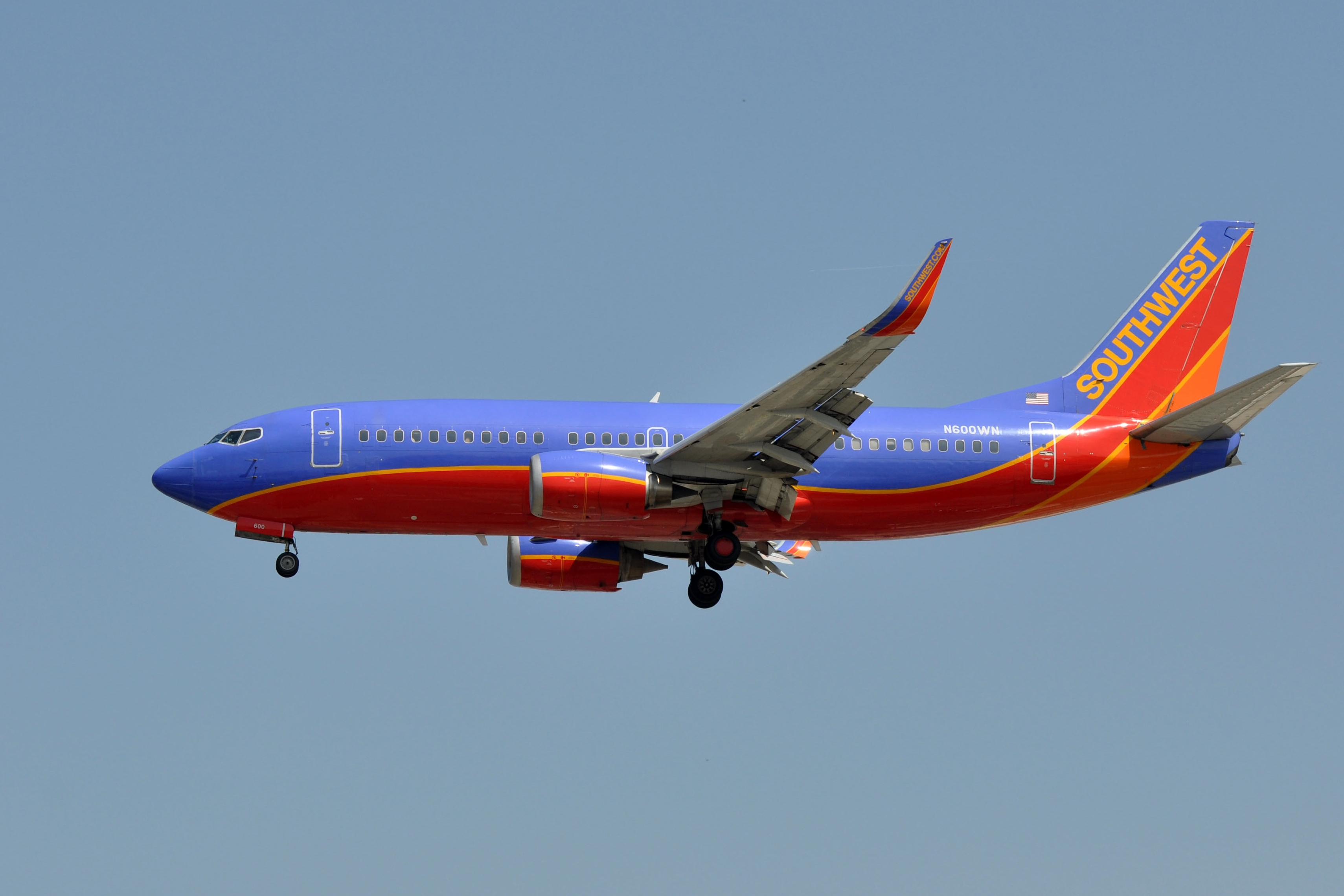 MSN 27694 LN 2699 B737-3H4 SOUTHWEST AIRLINES LAX AIRPORT